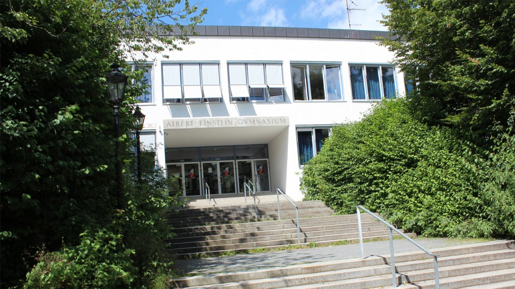 Es handelt sich um ein Foto des Haupteingangs des Albert-Einstein-Gymnasiums München im Sommer.